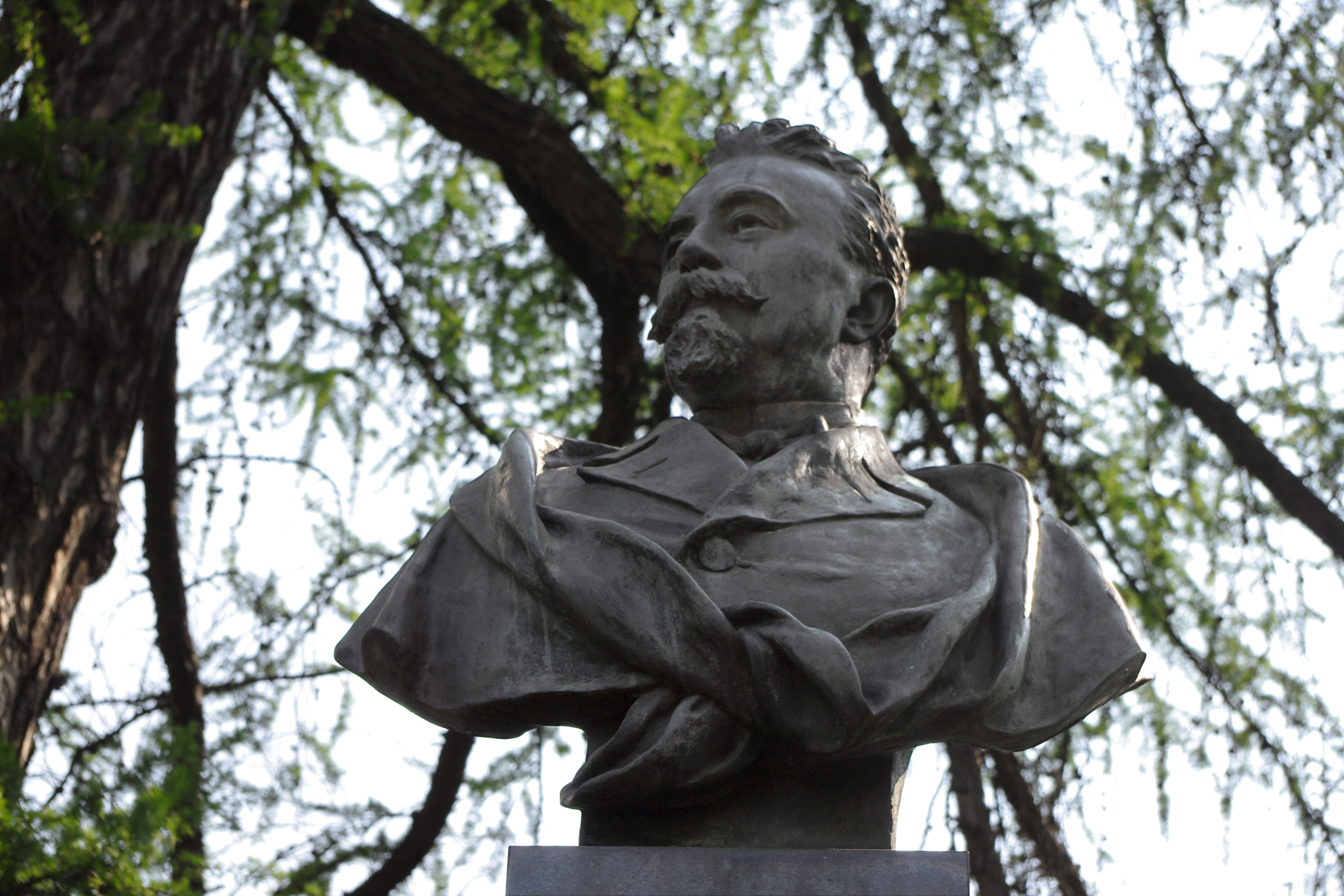 Grób lekarza Marcelego Nenckiego na Cmentarzu ewangelicko-reformowanym w Warszawie